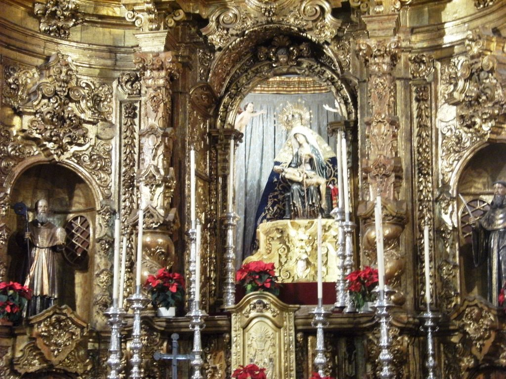 Iglesia Santa Maria de Africa,Ceuta,España.